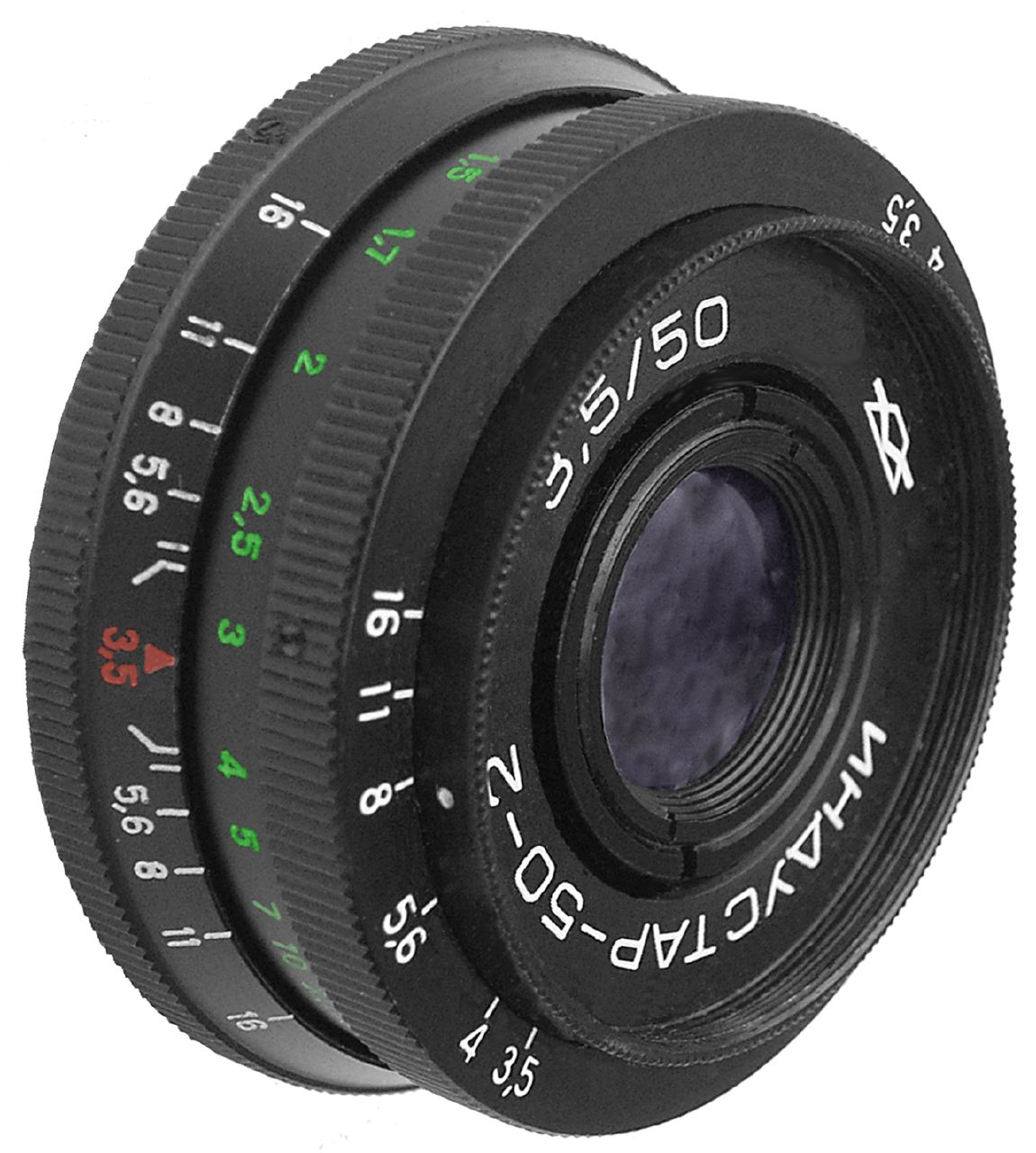 Wohl der kleinste „Pfannkuchen“ in 50 mm Brennweite für den M42-Anschluss. Das kaum 2 cm dicke Industar 50-2 darf mit seinem Durchmesser von 5 cm und seinem Gewicht von gerade 65 g doch mit Fug und Recht als pancake bezeichnet werden. Hergestellt wurde es von der Firma KMZ bei Moskau, die auch die Zorki und die Zenit produzierte. Es war ein Objektiv vom Tessar-Typ, das es in verschiedenen Ausführungen gab. Zunächst stellte man Industare mit Entfernungsmesser-Kupplung für die Leica-Kopien von Zorki her, eines davon dem versenkbaren „Elmar“ von Leitz sehr ähnlich, das andere mit starrem Tubus, beide für das Leica-Gewinde M39. Als KMZ 1951 die Spiegelreflexkameras „Zenit“ auf den Markt brachte, gehörte auch ein 50er Industar zur Ausrüstung. Obwohl ebenso mit M39-Gewinde, passte es nicht an die Meßsucher-Zorkis. Die Zenit wurde später auf M42 umgestellt, dazu brachte man dieses Industar 50-2 heraus. Es ist Tessar-typisch scharf. Da es nur eine manuelle Blende hat, ist der Umgang mit ihm etwas umständlich: Zum Einstellen der Blende muss die Kamera vom Auge genommen werden. Dazu kommt noch, dass sich dabei der Entfernungsring mitdreht, wenn man ihn nicht festhält. Trotz dieser Einschränkung ein originelles Stück, das auch preisgünstig zu erwerben ist: ab 10 Euro, wenn man Glück hat, noch mit einer Zenit dran ;-)